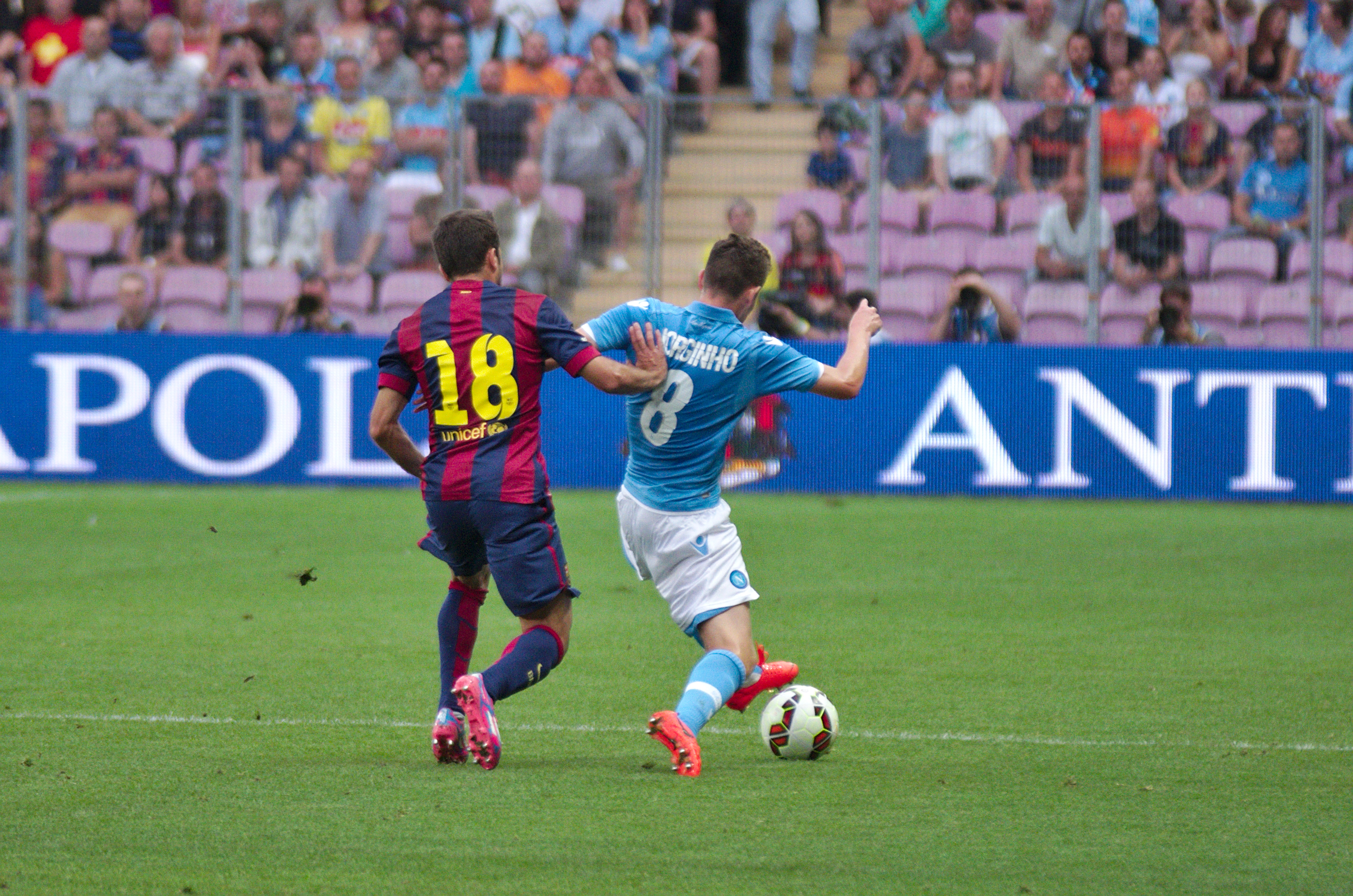 Barça - Napoli - 20140806